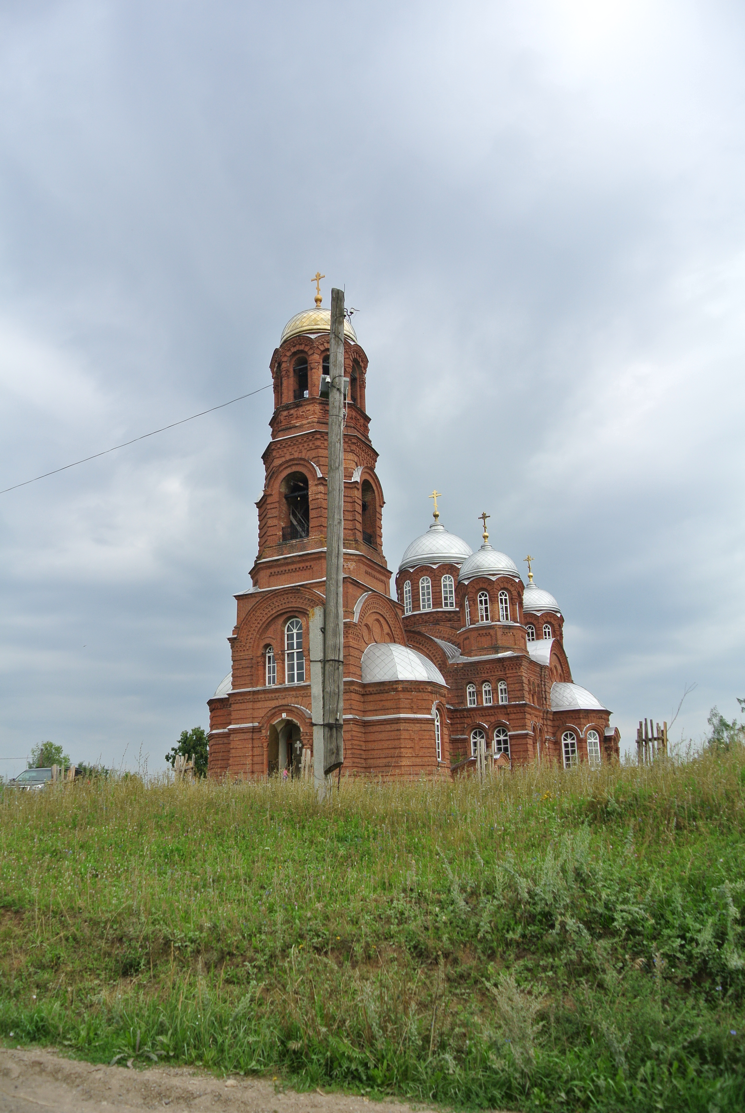 Храм в с. Ершовка (пригород Сарапула)